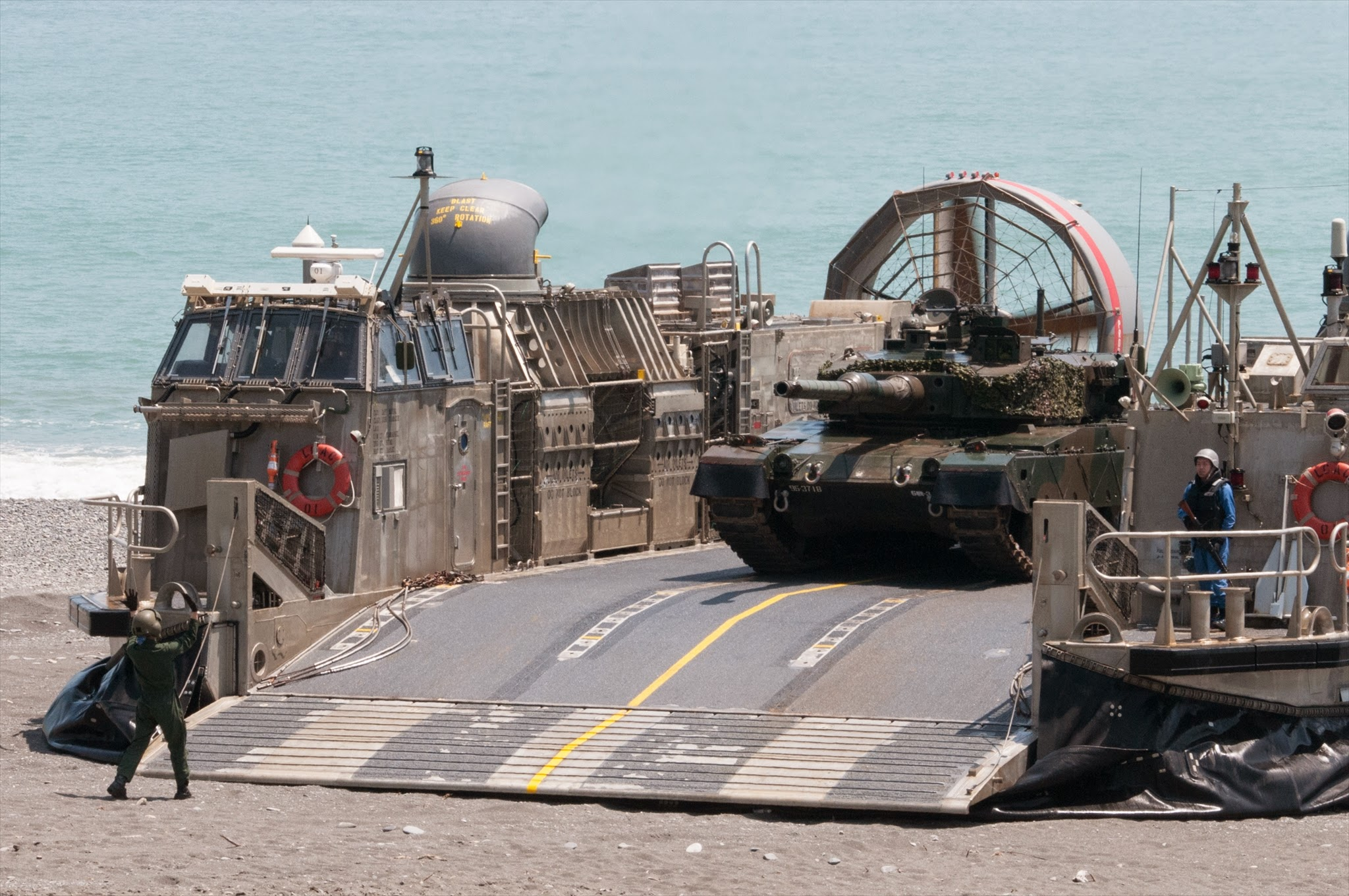 ９０式戦車（協同転地演習）